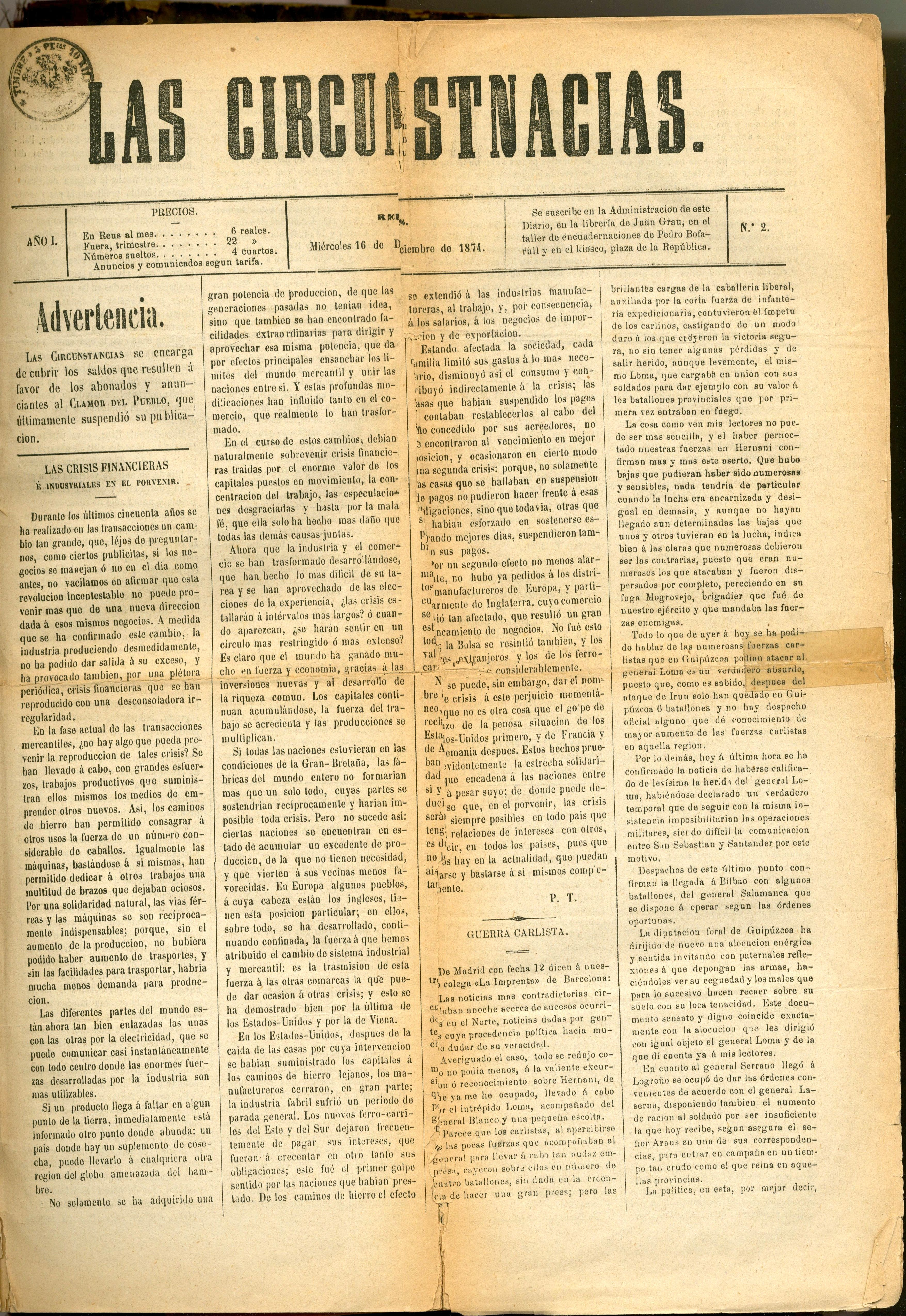 Primera pàgina del número 1 de Las Circunstancias